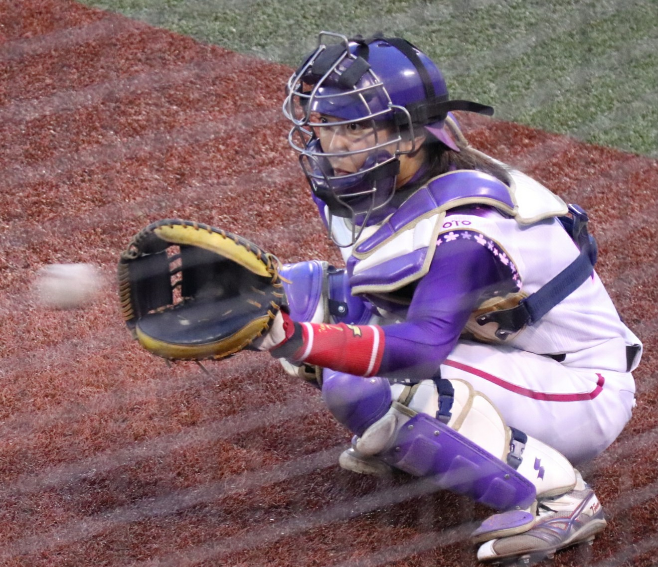 京都フローラキャッチャー